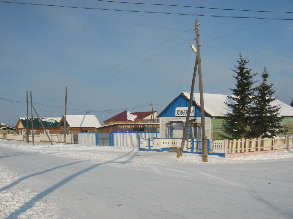 shop, Kedanda village, Vilyuski uluus, Yakutia, Siberia- Магазин "Кеданда"